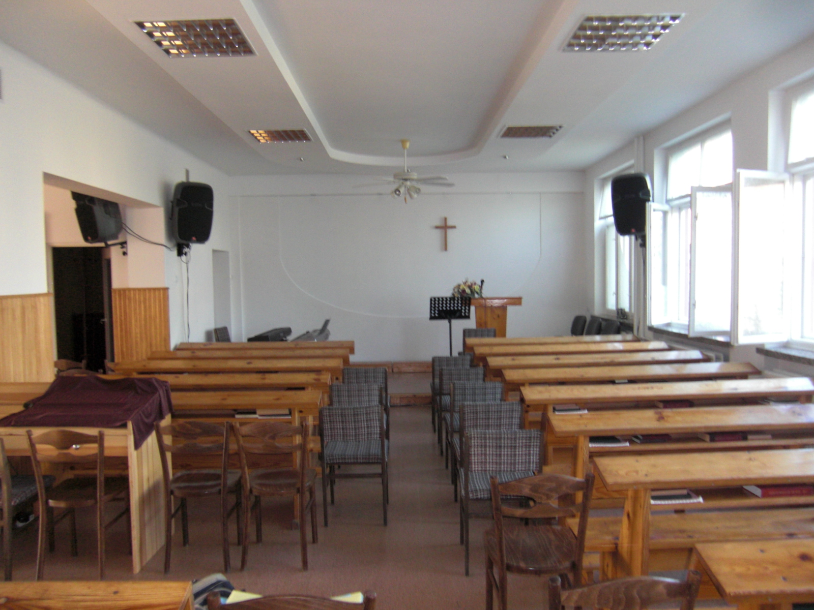 Zbór Kościoła Zielonoświątkowego w Hajnówce 2013-06-19